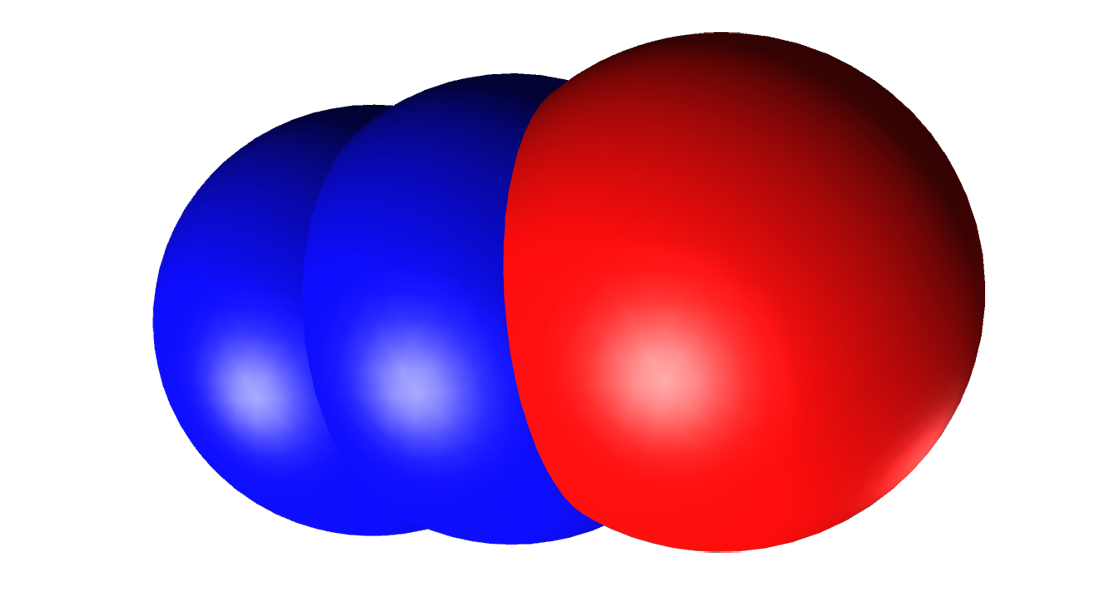 Struttura 3D sfere van der Waals